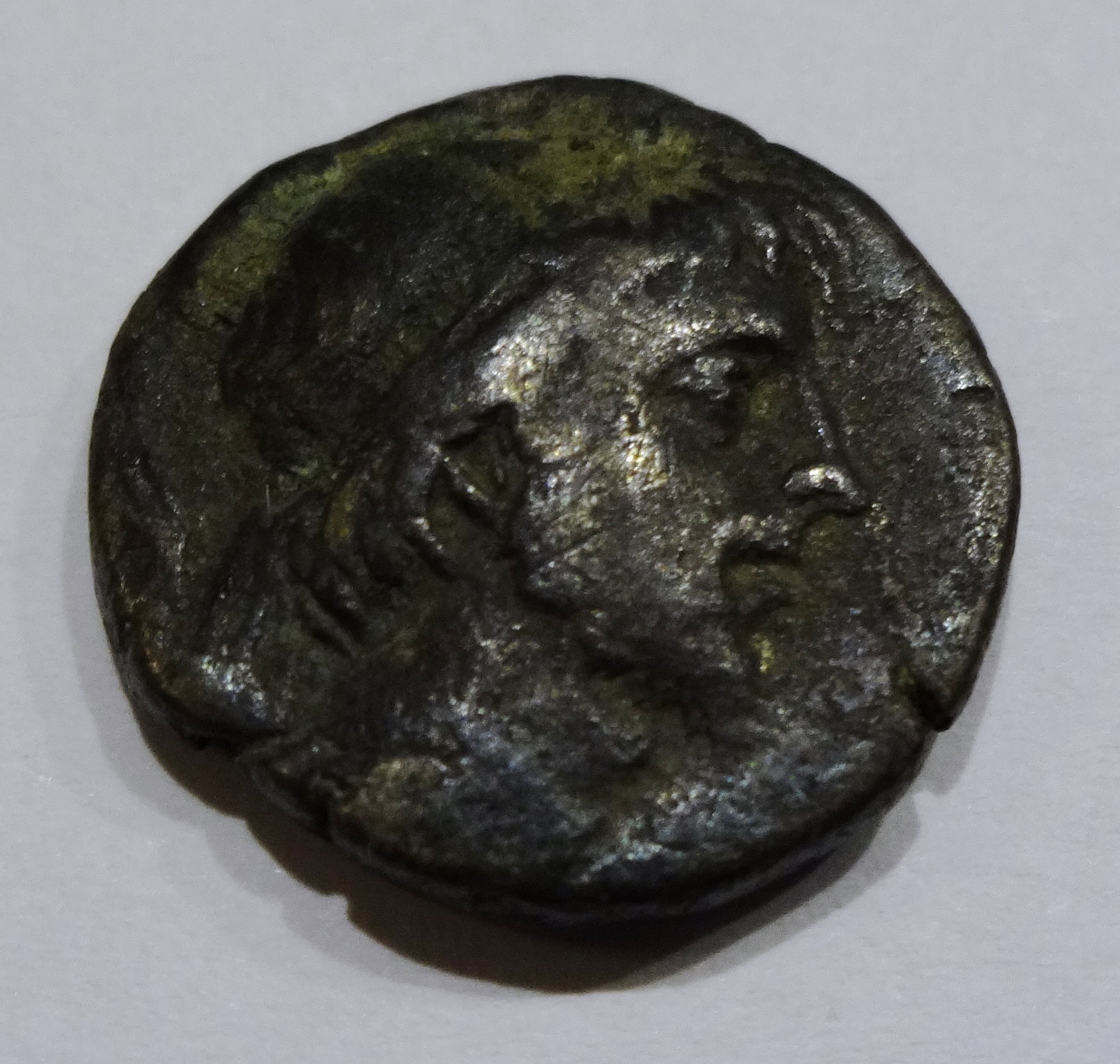 Ariobarzanes III. auf der Vorderseite einer Drachme, vgl. Katalog Szaivert/Sear Nr. 7094